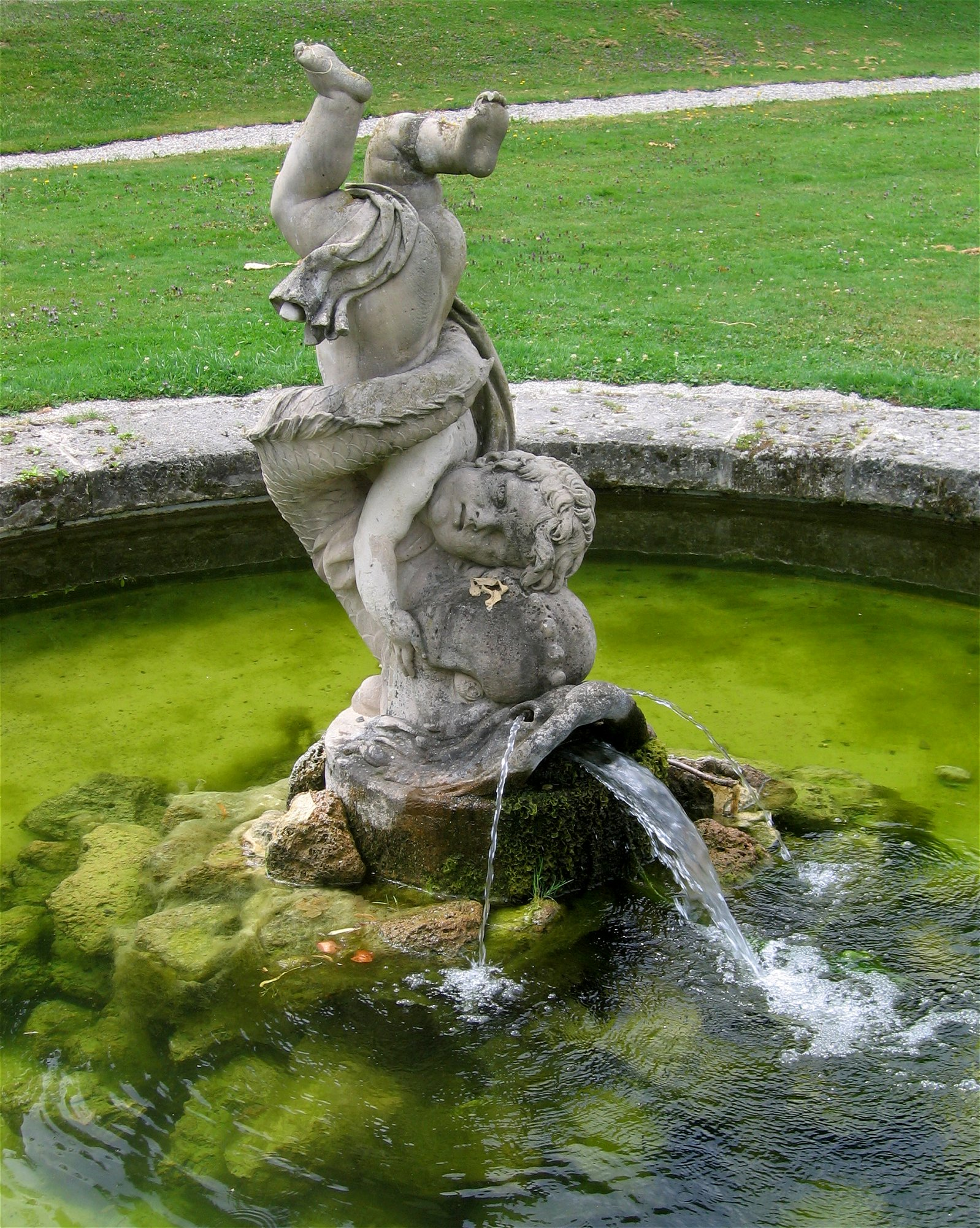 Brunnenfigur im Schlosspark Nymphenburg, München, von Peter Lamine (1816), "Knabe der von einem Delphin in die Tiefe gezogen wird"